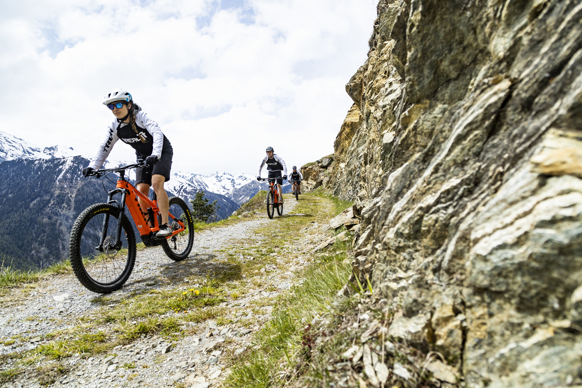 Mountainbiken mit der AREA 47